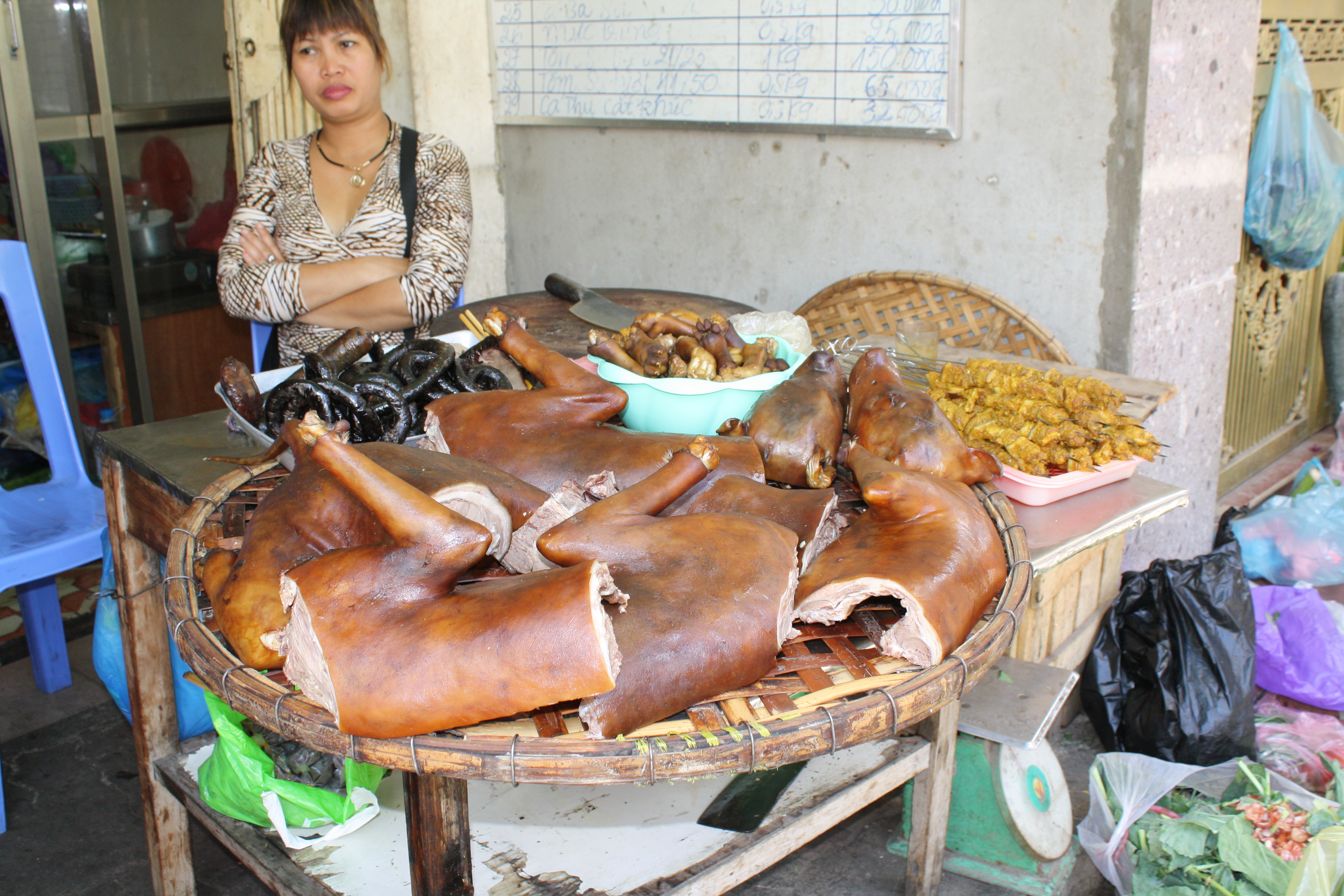 Dog meat in Hanoi, Vietnam.